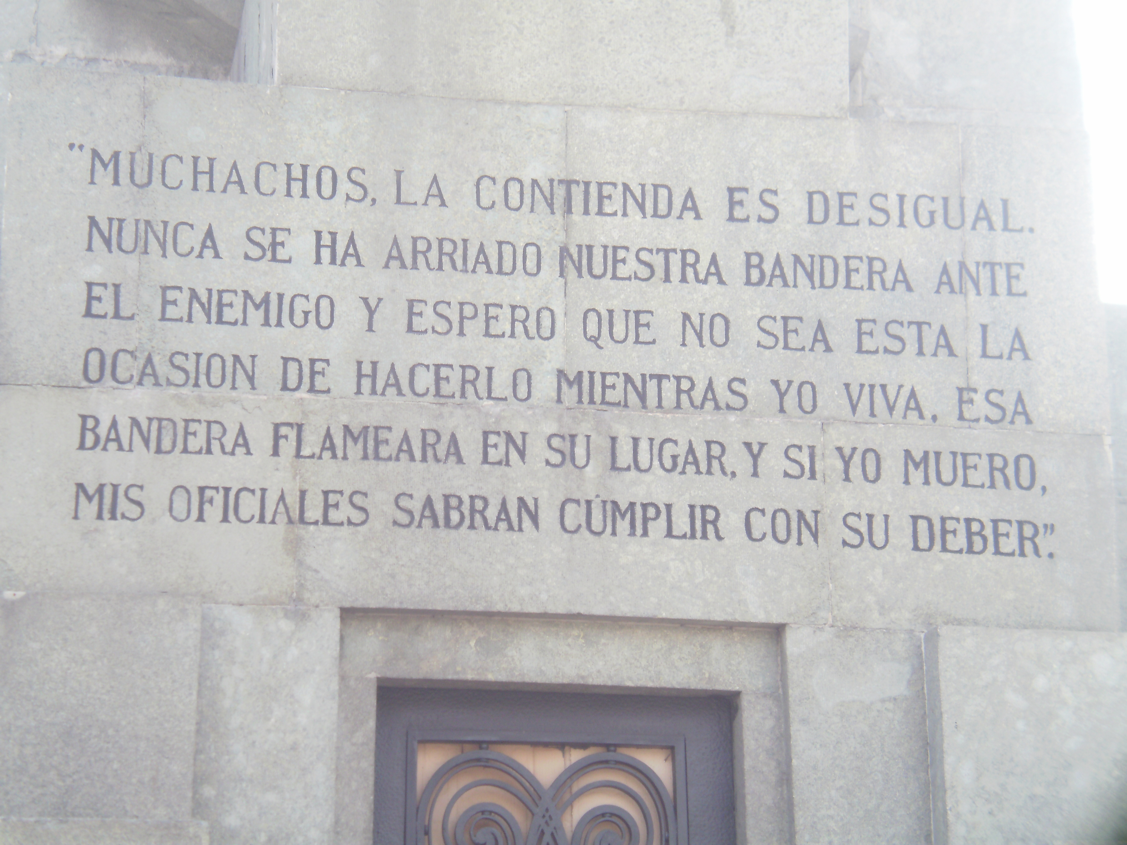 Famosa arenga de Arturo Prat antes del combate naval de Iquique, escritas en el pedestal de su monumento en Santiago de Chile